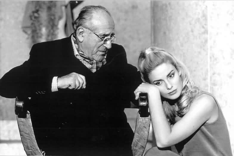 Arnoldo Foà con Giada Desideri